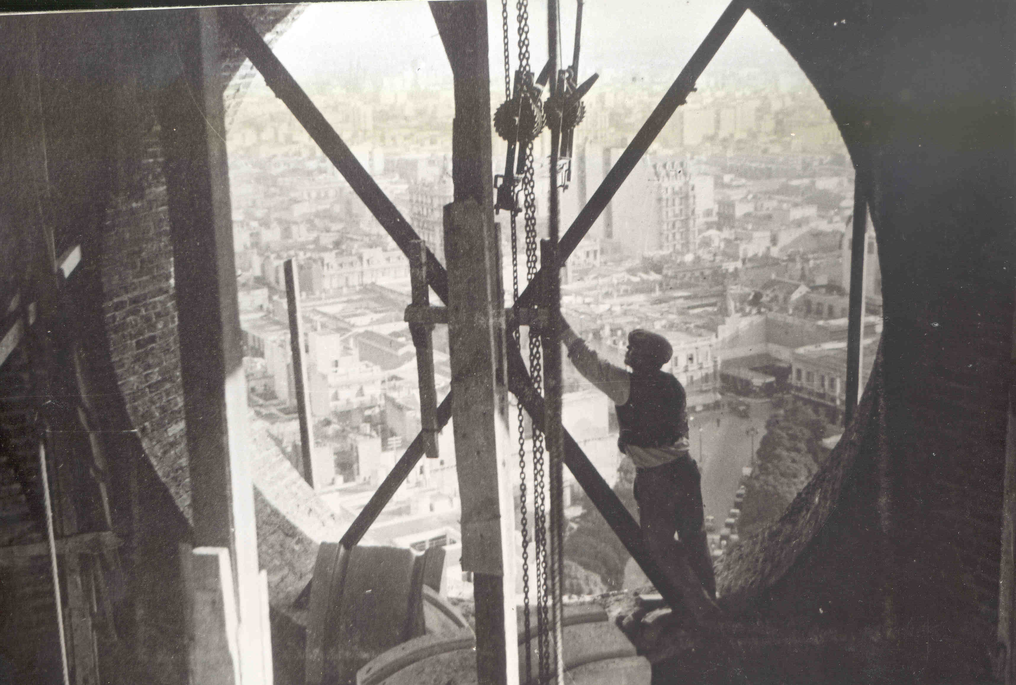 Imagen histórica del Palacio de la Legislatura de la Ciudad de Buenos Aires